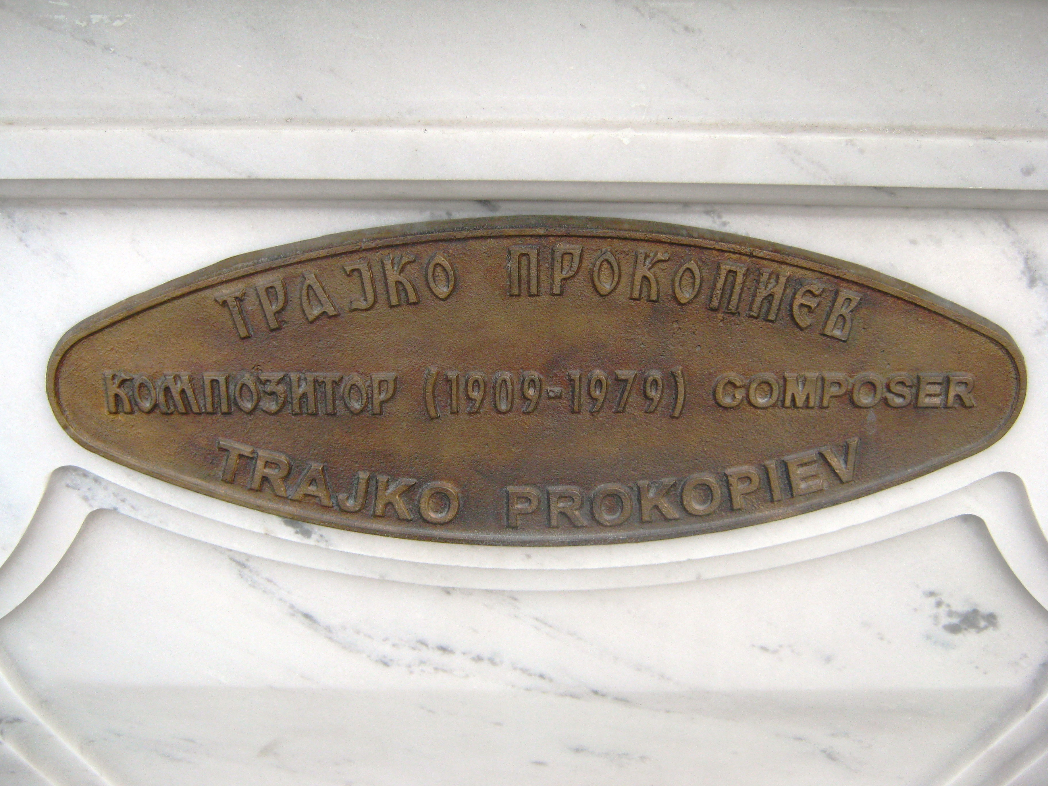 Натписна плоча на Трајко Прокопиев